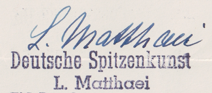 Unterschrift der deutschen Spitzenklöpplerin Leni Matthaei